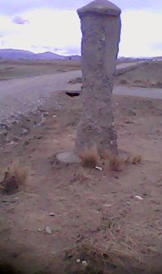 Columna antiguo hecha de cemento de la poblacion Calasaya